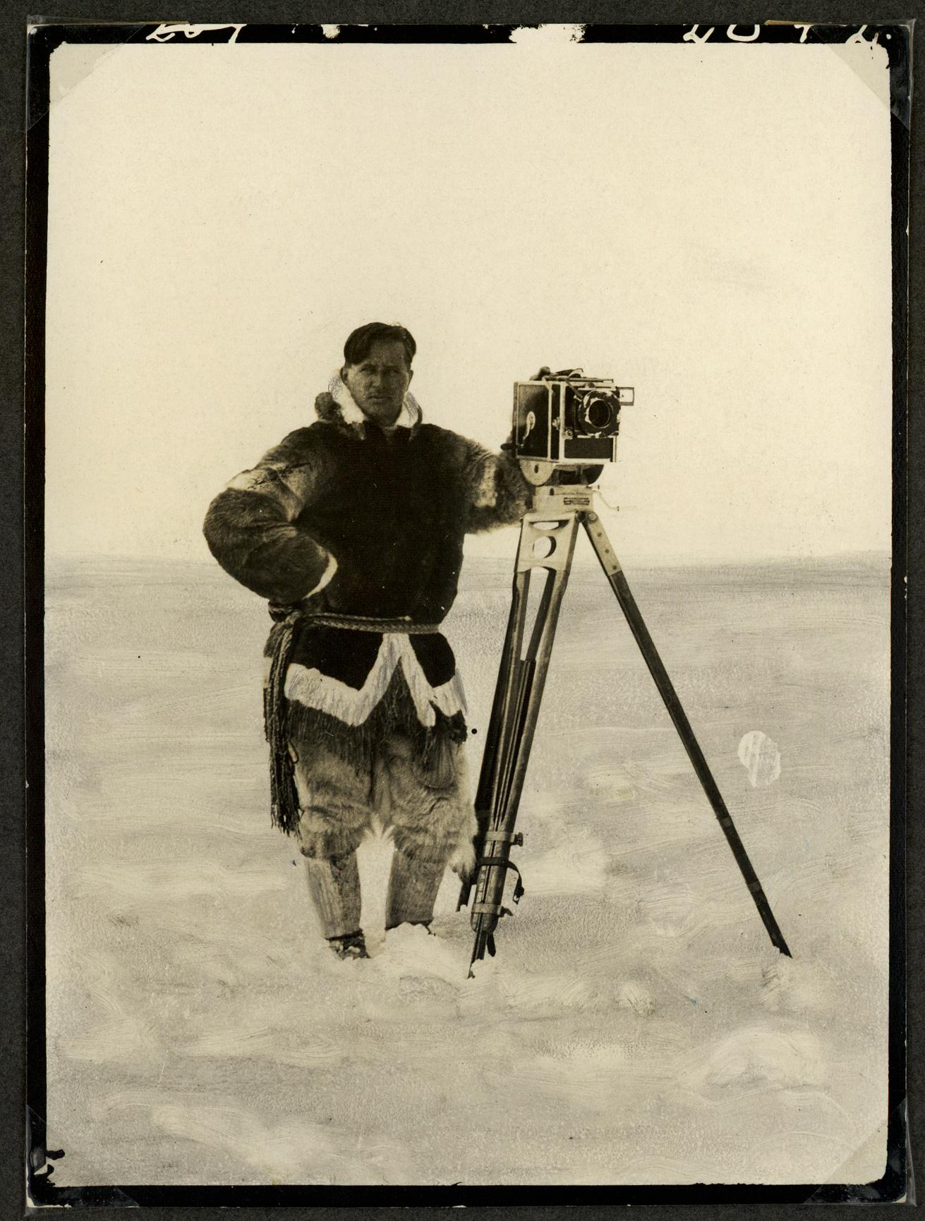 Leo Hansen med sit filmapparat på Danske Øen i Østcanada. Leo Hansen var fotograf på Knud Rasmussens 5. Thuleekspedition, hvor han både fotograferede og filmede. På billedet er Leo Hansen iført en yderpels af rensdyrskind, som var indsamlet hos canadiske inuit. Derimod er bukserne af isbjørneskind og sælskindstøvlerne lavet i Nordgrønland og bæltet er europæisk. Frynserne nederst på yderpelsen forhindrede kulde og sne i at komme ind under dragten. Leo Hansen with his camera on Danske Øen in East Canada. Leo Hansen was a photographer on Knud Rasmussen’s 5th Thule-expedition and shot both films and photos. In this picture he is wearing one of the a parka of caribou skin collected from the Canadian Inuit. In contrast his polar bear trousers and sealskin boots were made in North Greenland and the belt is European. The fringes at the lower hem of the parka should prevent snow and cold to seep under the garment.